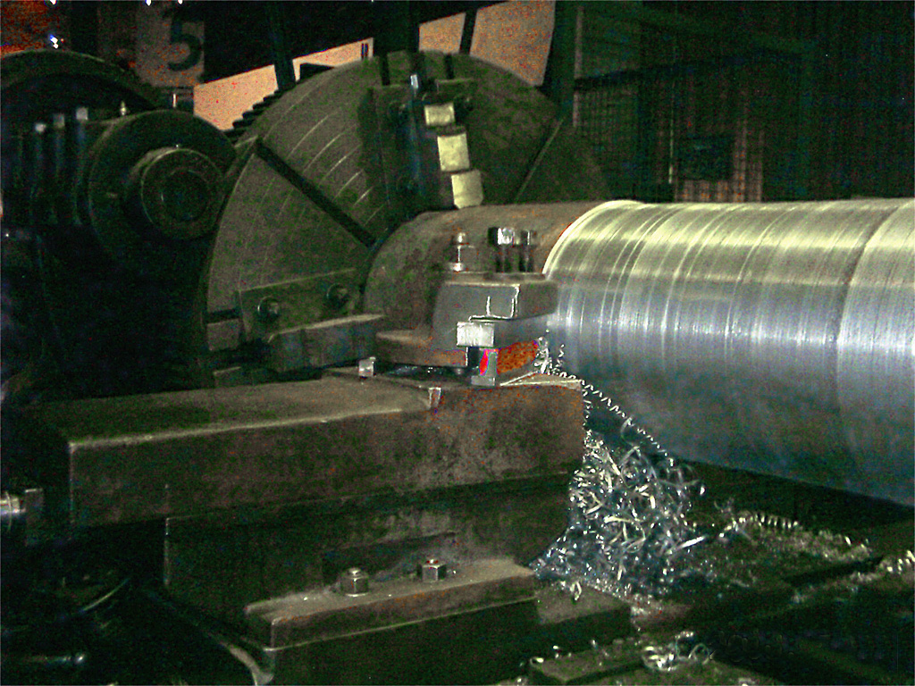 Details an einer Drehmaschine (Industriemuseum / Duisburg)